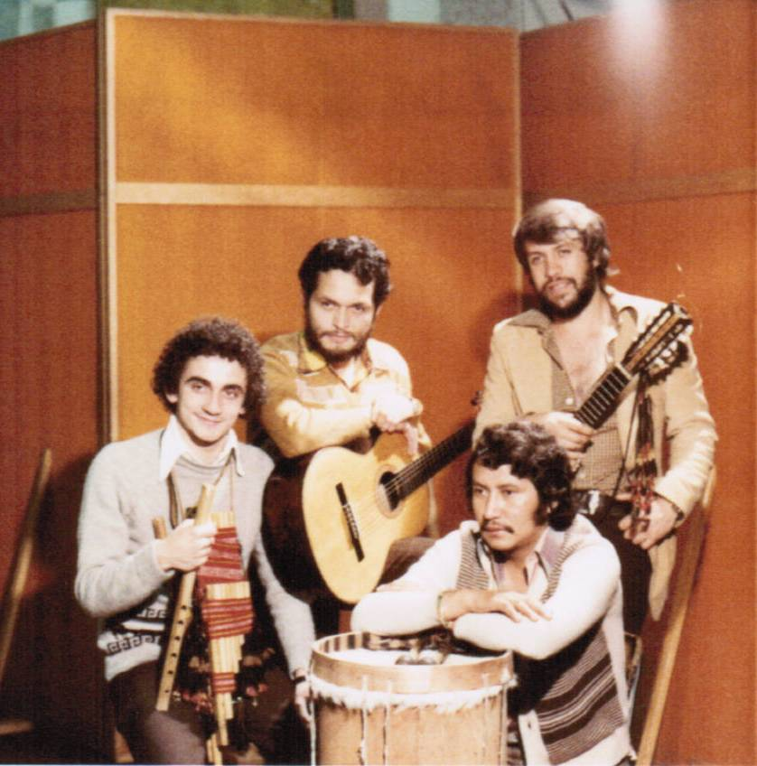 Maestro “Sicuri Andino” de los Aerófonos Bolivianos Andean Master Sicuri, of the Bolivian Wind Instruments. Autor y Compositor, además de: arreglista y Recopilador An ICON and “Master Virtuoso” of the Aerófonos Bolivianos: Kenas, Sicus, Moxeños, Tarkas, & many others of the Aymara ancestral Instruments. His brilliant Artistic Career spans over five decades and over 50 countries across the Globe, including France, Japan, Russia, USA, Lebanon, Australia, UK, Germany, Brasil, Argentina, Perú, Chile, Costa Rica, Panamá, Venezuela & others. He was a Proud Delegate of SOBODAYCOM – Bolivia and “CULTURAL AMBASSADOR” of the Bolivian Arts bringing his Gift to the World. Nació en Cochabamba Bolivia el 20 de mayo de 1957 Cofounder of Kjarkas Nairas Puka Wara Khanata Tinkuna Antara Kausay and also member of Sukay